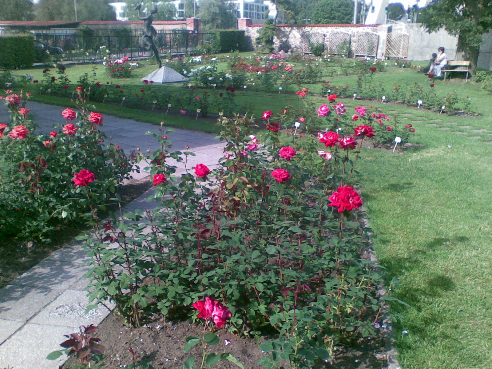 Tartu botaanikaaia rosaarium.